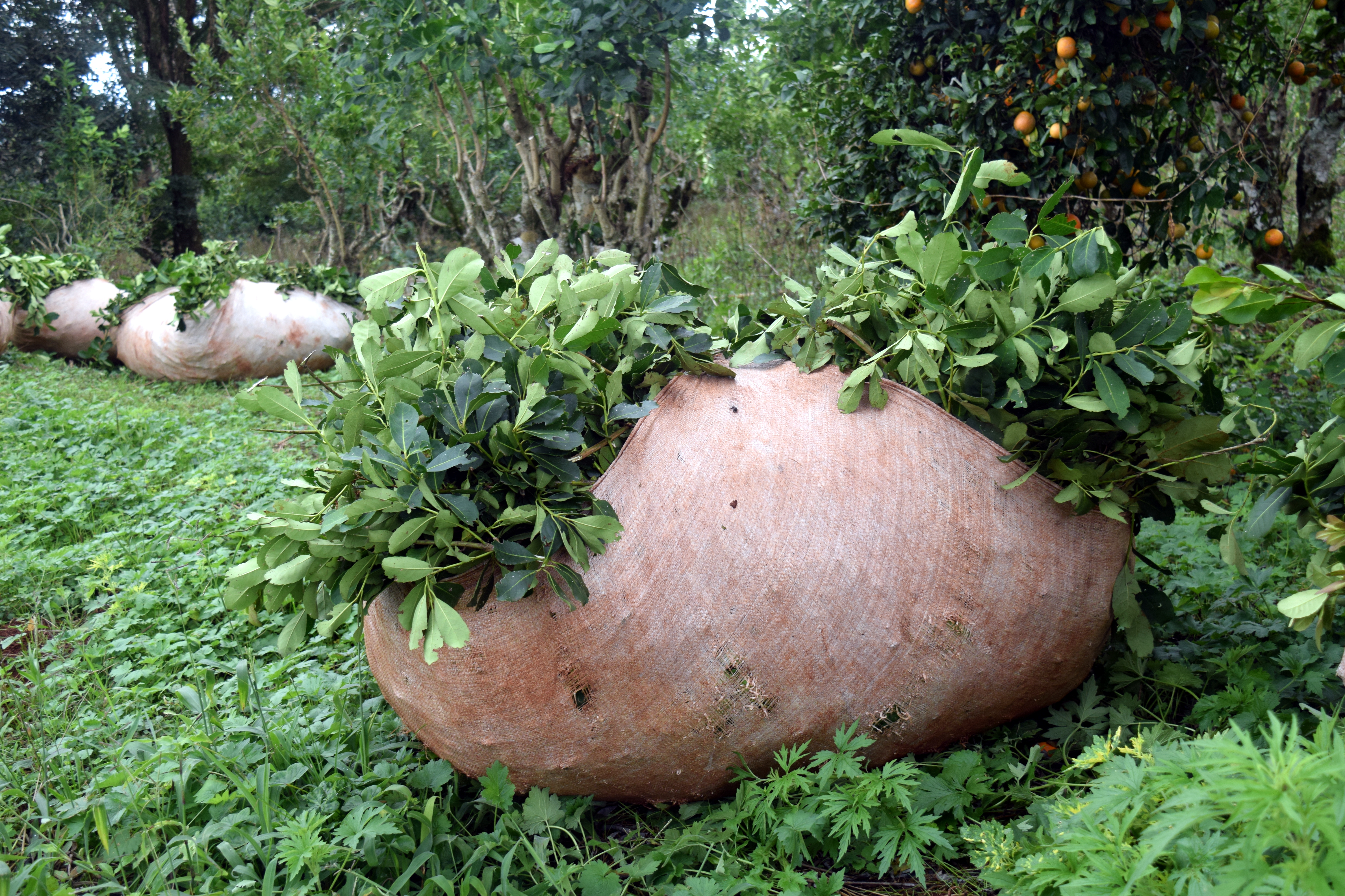 Raídos (lienzos plásticos atados en sus cuatro puntas) de Yerba Mate, antes de ser llevados a un secadero en la localidad de Campo Ramón, Misiones, Argentina.